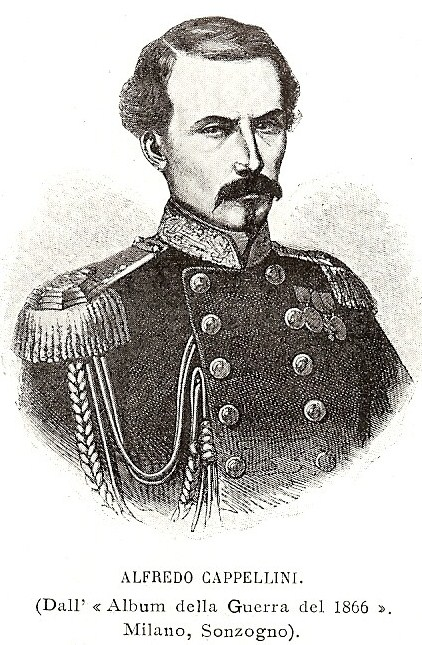 L'immagine si trova nel libro: I liberatori Glorie e figure del Risorgimento di Pasquale de Luce, stampato dall'Istituto Italiano di Arti Grafiche- Editore di Bergamo nel 1909